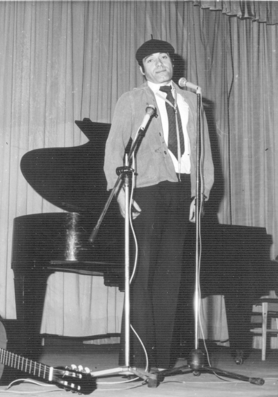 Forgács Gábor a Ganz Műszer Művek műszerbálján